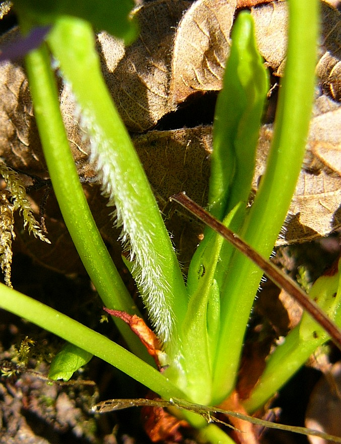 Wunderveilchen Stängelbehaarung